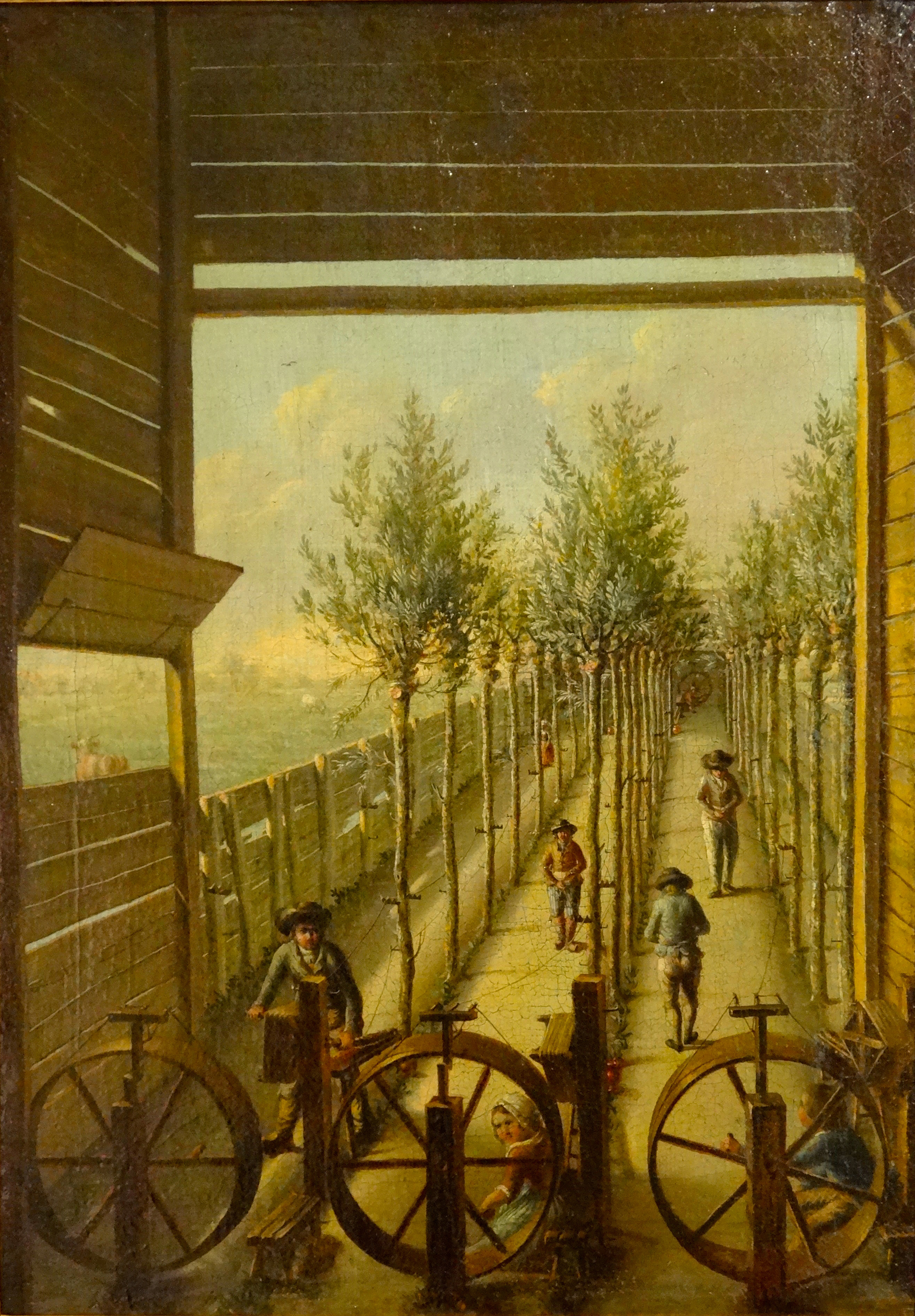 Kleingarenbaan aan het Jaagpad te Gouda in 1795title QS:P1476,nl:"Kleingarenbaan aan het Jaagpad te Gouda in 1795" label QS:Lnl,"Kleingarenbaan aan het Jaagpad te Gouda in 1795"